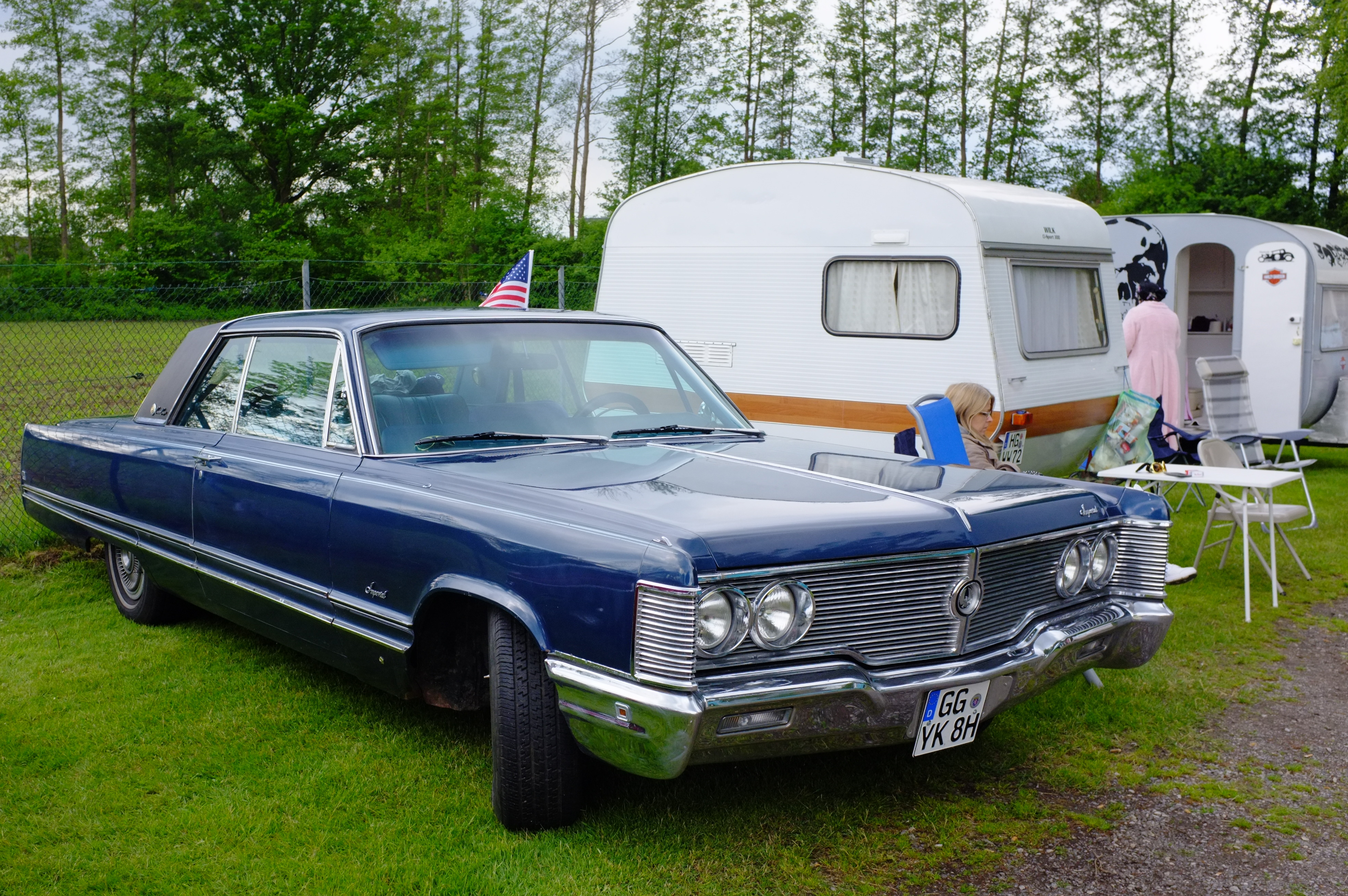 Straßenkreuzertreffen Kaunitz 2015